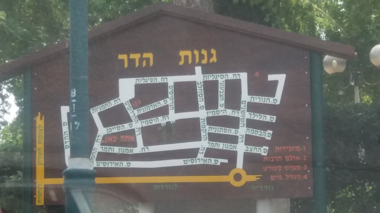 מפת היישוב גנות הדר